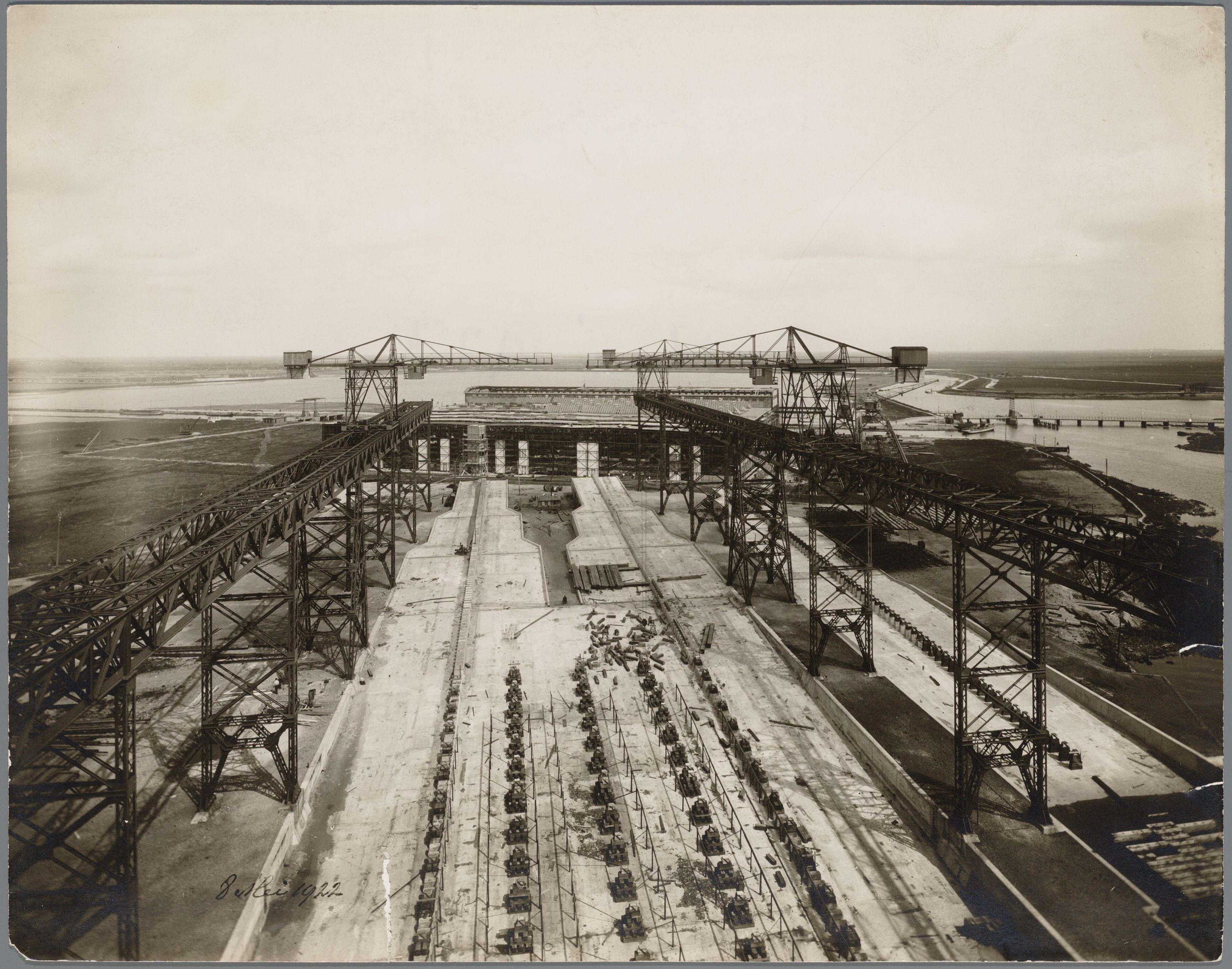 Beschrijving Helling gezien in noordwestelijke richting naar de scheepsbouwloods Helling op de nieuwe werf van de Nederlandsche Scheepsbouw Maatschappij (N.S.M.). Op de achtergrond, na de loods en het Cornelis Douweskanaal, de baggerbergplaats; rechts Zijkanaal I. De nieuwe werf aan de overkant van het IJ met adres Cornelis Douwesweg 1 werd op 6 oktober 1922 officieel in gebruik genomen. Documenttype foto Vervaardiger Oosterhuis, Gustaaf (1858-1938) Collectie Archief Nederlandse Dok- en Scheepsbouw Mij.: foto's Datering 8 mei 1922 Geografische naam Cornelis Douweskanaal Zijkanaal I Cornelis Douwesweg IJ Inventarissen Afbeeldingsbestand 010179000305 Generated with Dememorixer